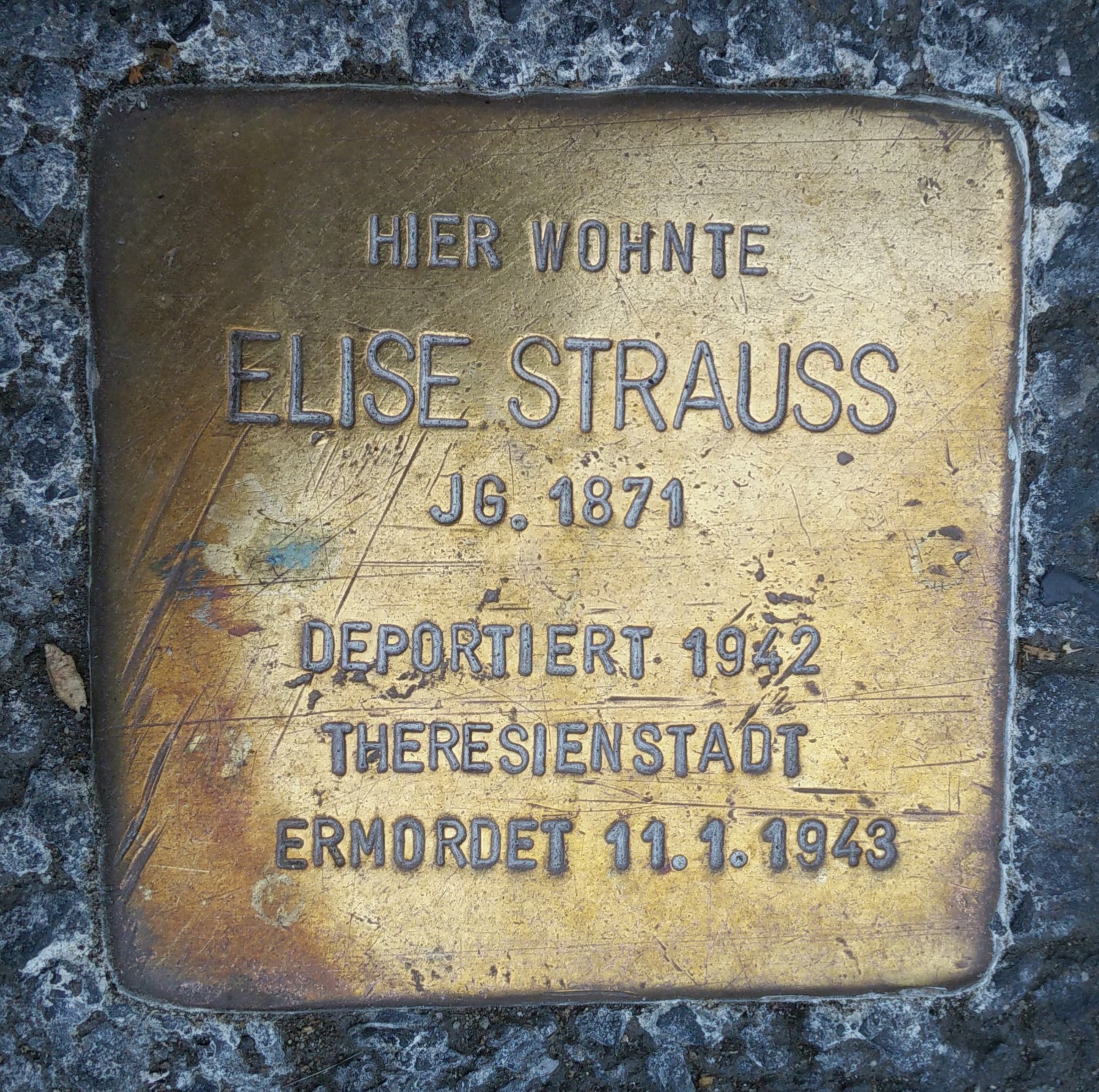 Bad Vilbel, Stolperstein Elise Strauss